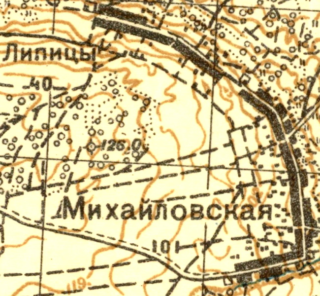 Топографическая карта Ленинградской области, квадрат О-35-12-Г (Ропша), деревня Михайловская